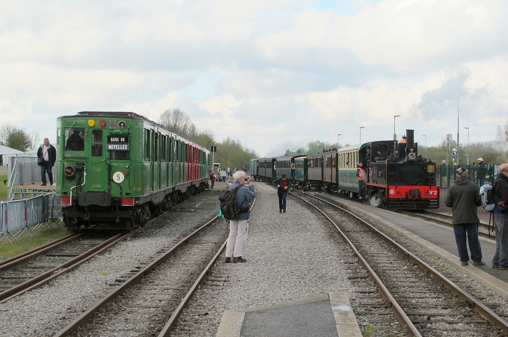 La rame Sprague-Thomson stationne en gare de Noyelles, pendant qu'un train arrive de Saint-Valery, en fin de journée du 16 avril 2016 sur le chemin de fer de la baie de Somme.